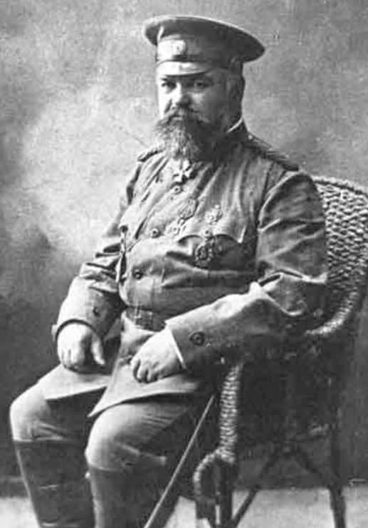 Alexei Maximowitsch Rehbinder, russ.: Алексей Максимович Ребиндер (1795–1869), russischer Generalleutnant und Unternehmer